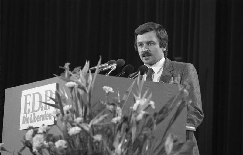 29./30.1.1983 Außerordentlicher Bundesparteitag der FDP in der Stadthalle Freiburg